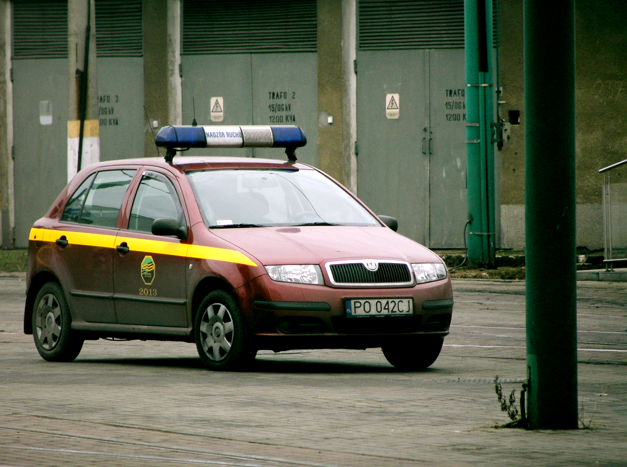 Nadzór ruchu. Wóz MPK Poznań.